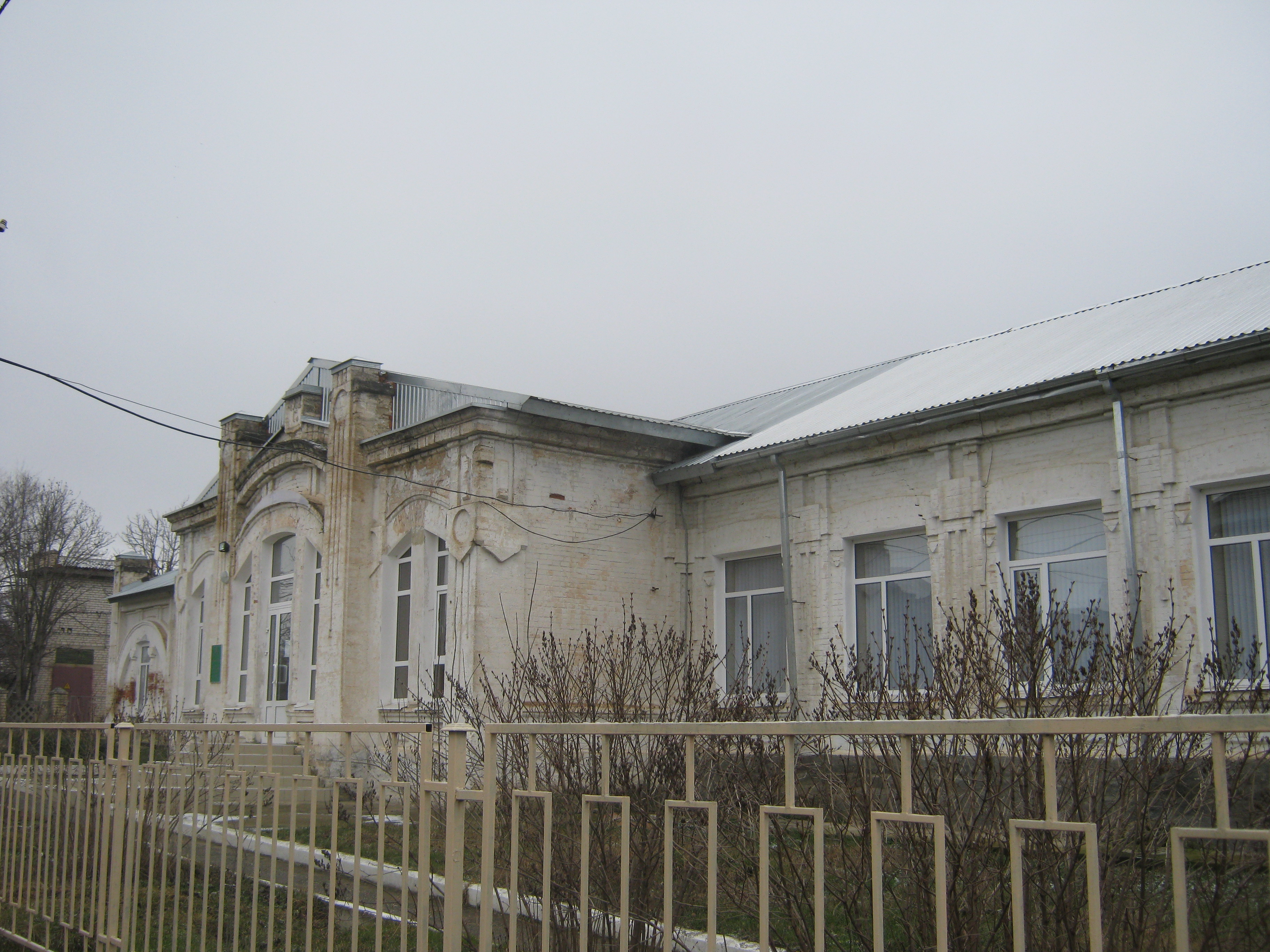 Здание в котором распологалась земская больница в селе Петровском (Светлоград)